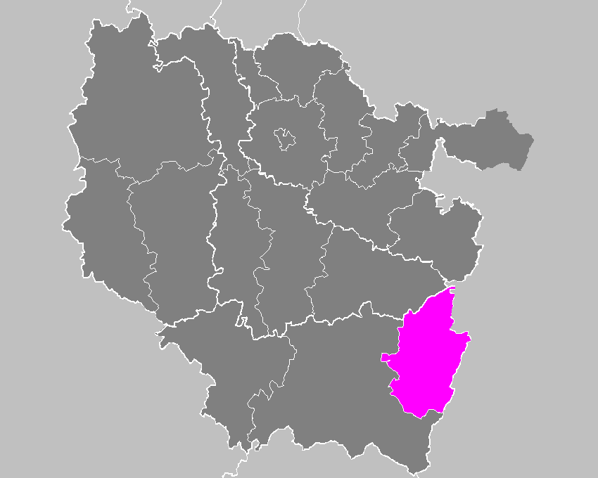 Maps of arrondissements and cantons of France: Arrondissement de Saint-Dié-des-Vosges.PNG